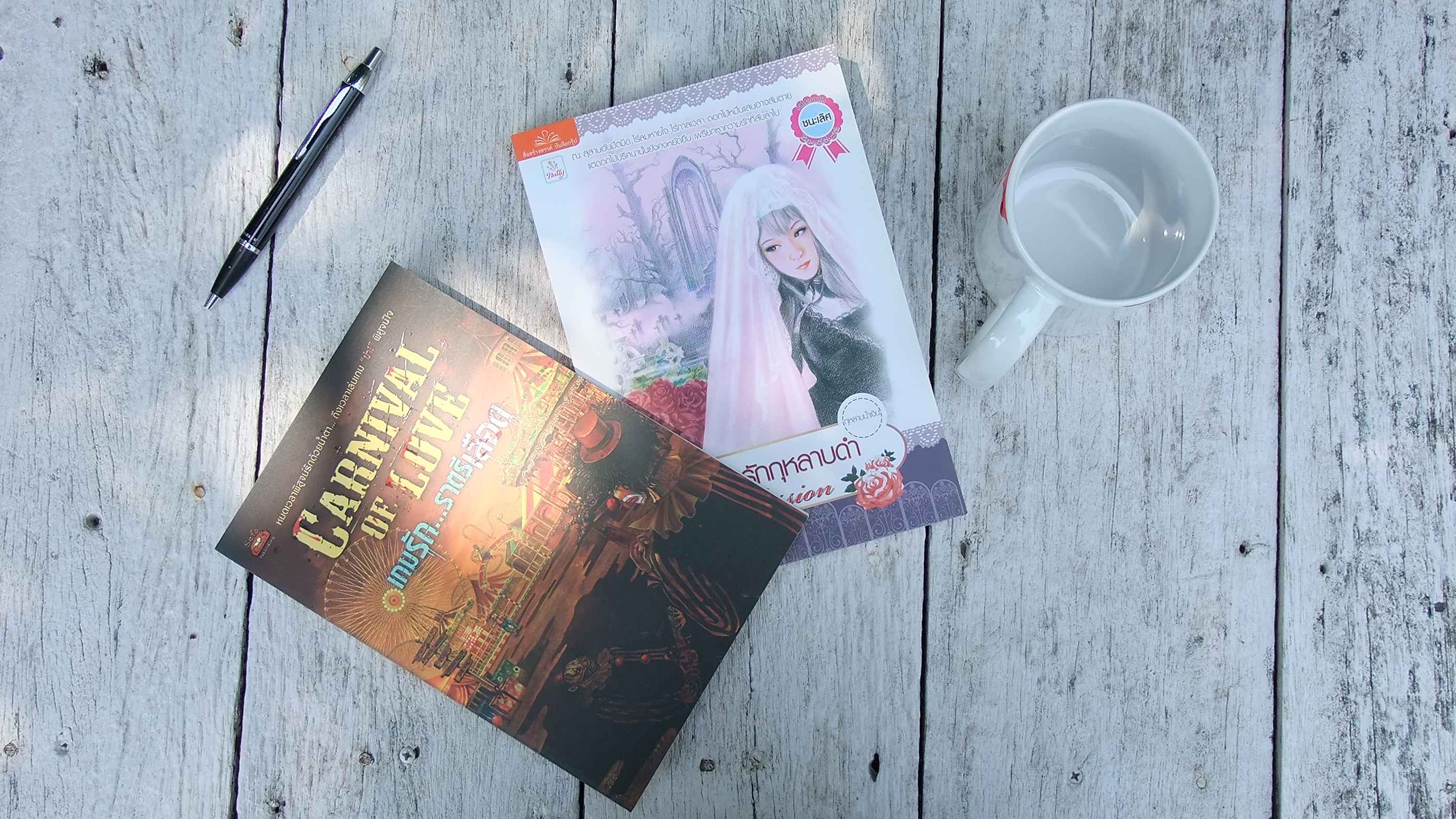 ผลงานเขียนของมายาโรส